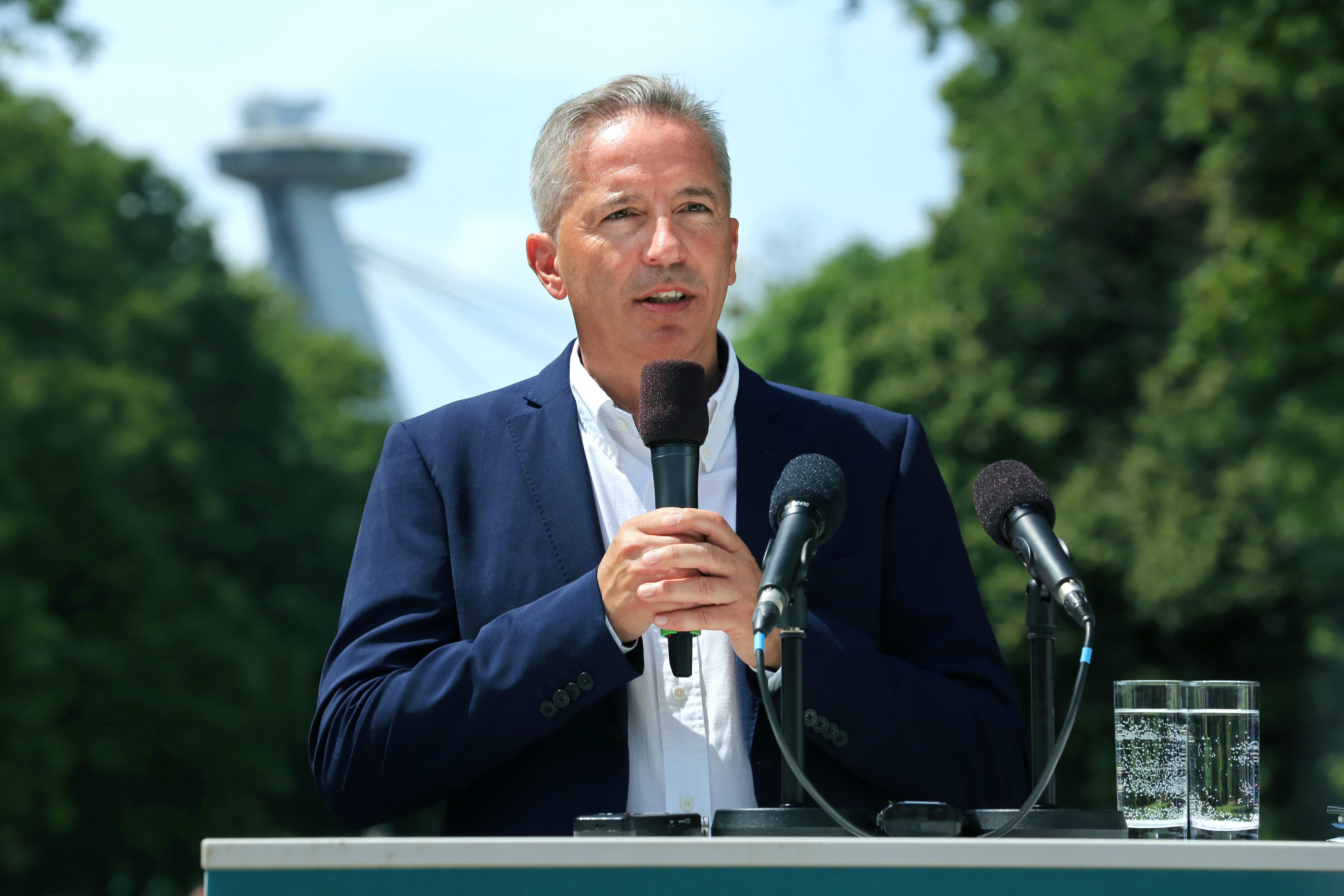 ohlásenie kandidatúry, Sad Janka Kráľa